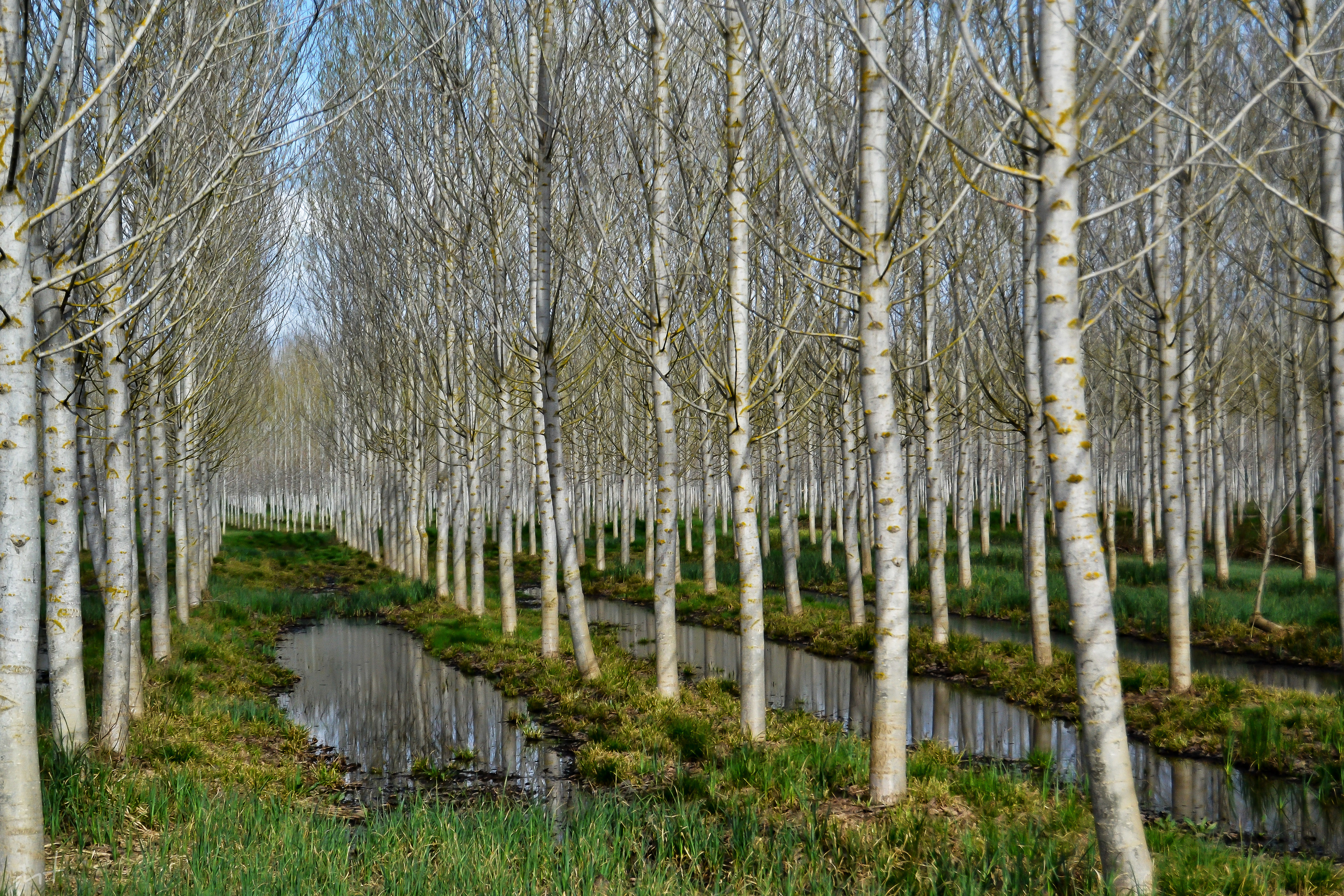 Estany de Sils (Selva) This is a a photo of a natural area in Catalonia, Spain, with id: ES510109